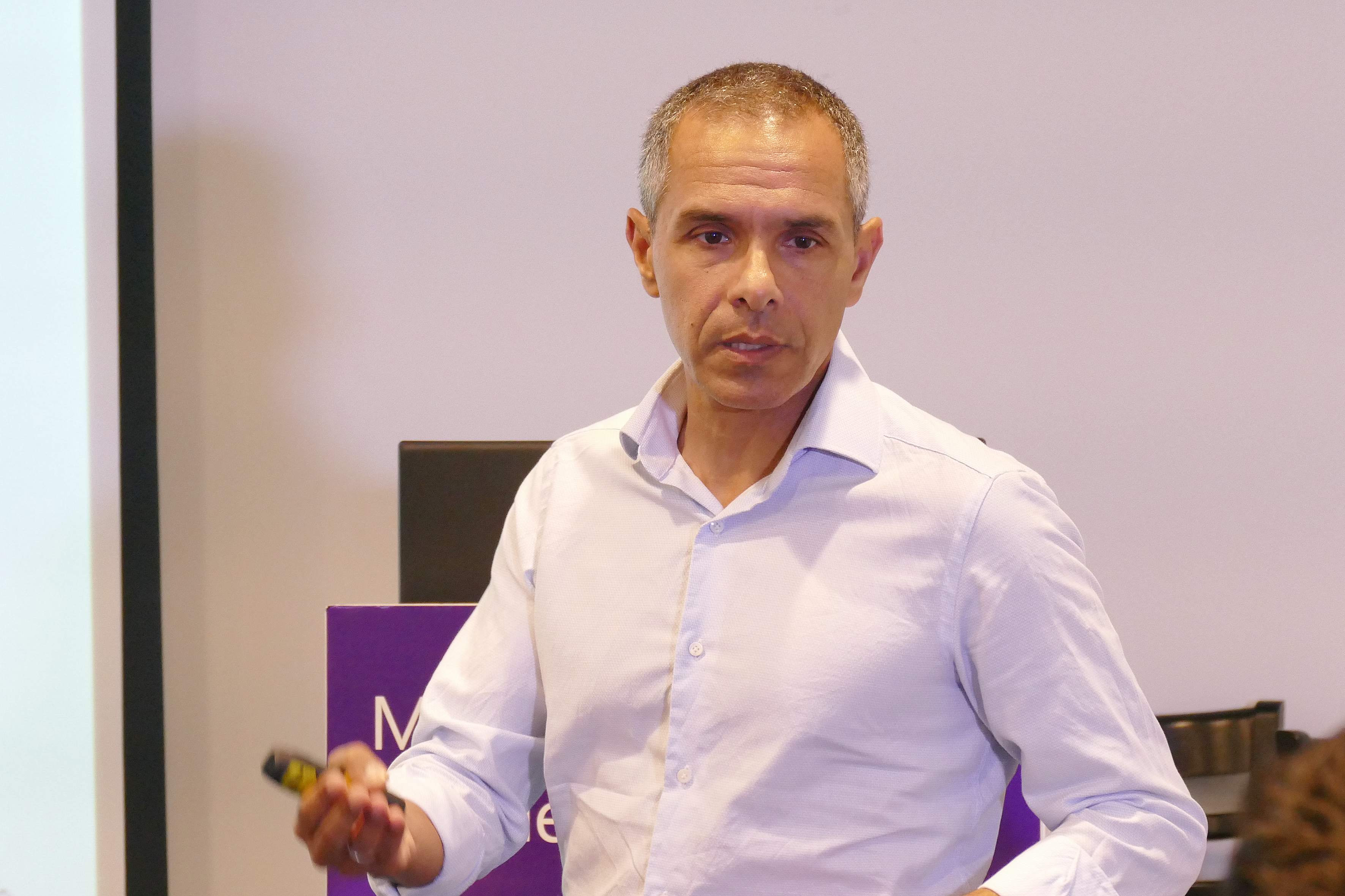 פרופסור ניראון חשאי